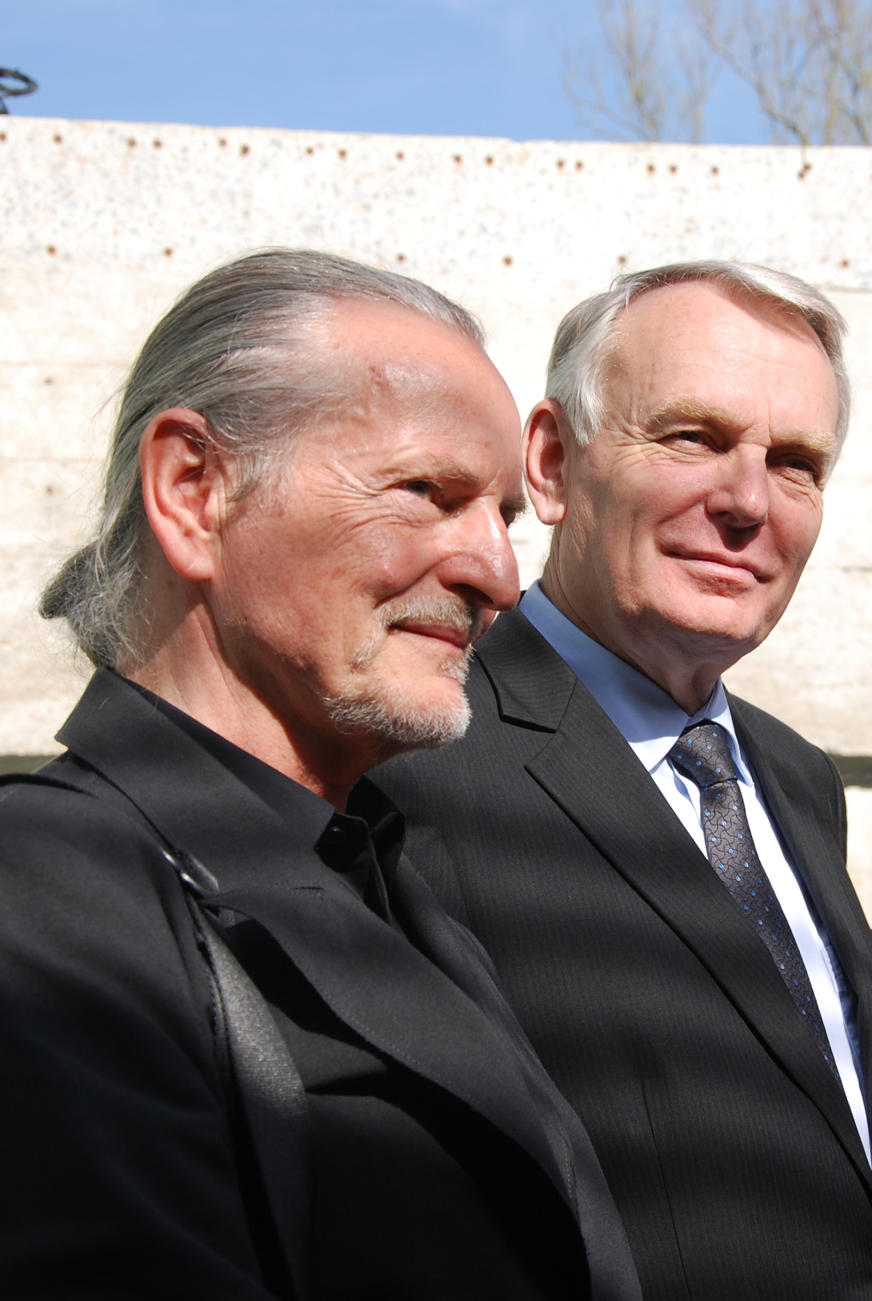 Krzysztof Wodiczko et Jean-Marc Ayrault : Inauguration du Mémorial de l'abolition de l'esclavage de Nantes, le 25 mars 2012.